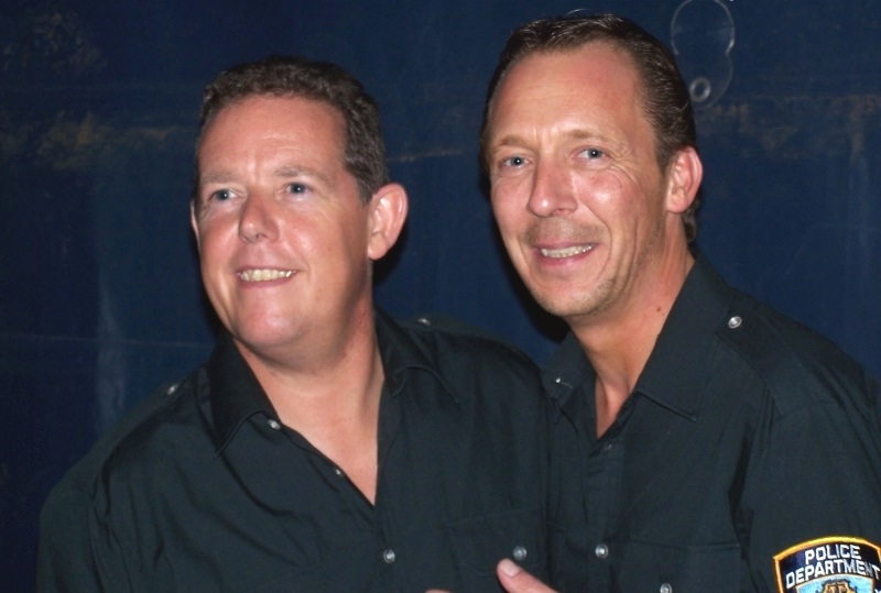 "Toto & Harry" bei Zelt Festival Ruhr 2008 in Bochum!